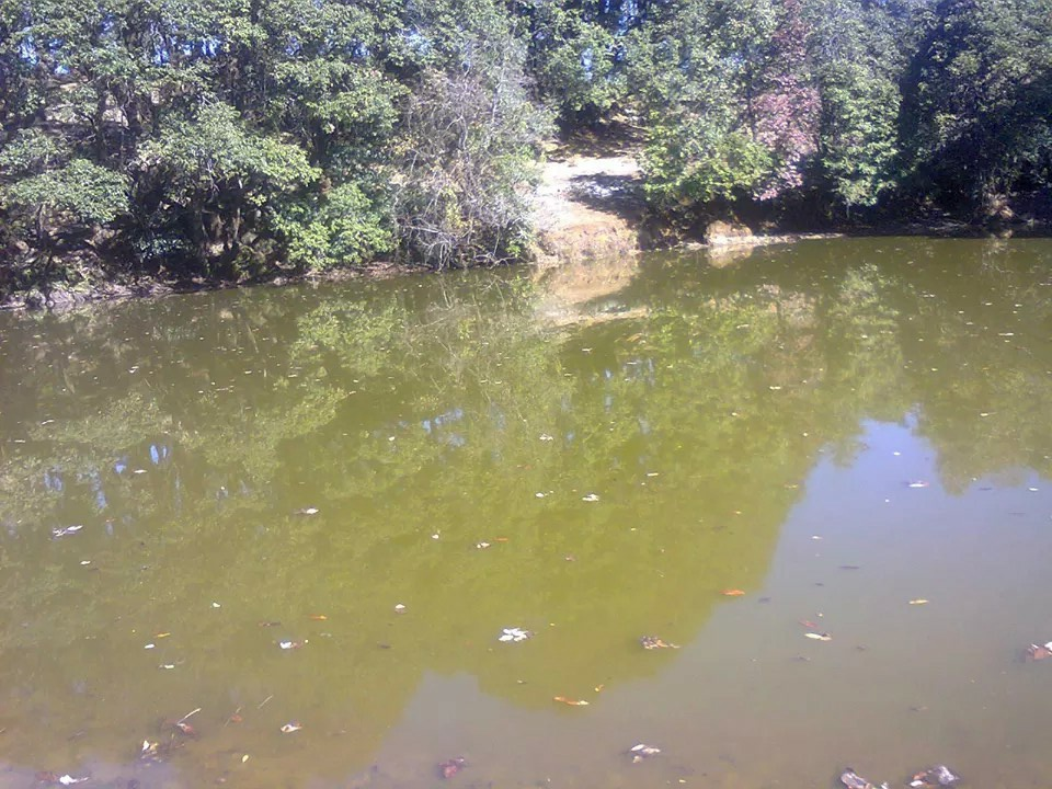 पताल भुमेश्वर ताल